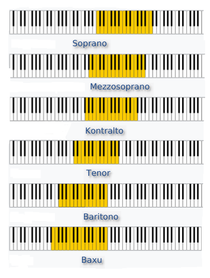 Ahots mota ohikoenak